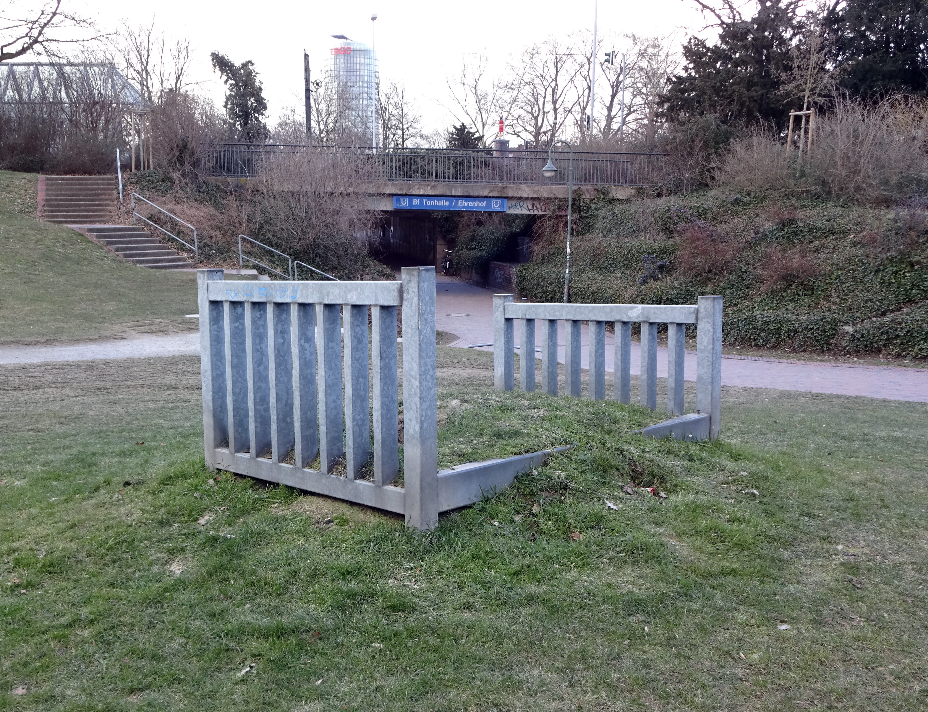 Großmutter Erde, Sandro Antal, 1988, verzinkte Stahlprofile, Erde, Hofgartenrampe an der Fritz-Roemer-Straße, 02_2018